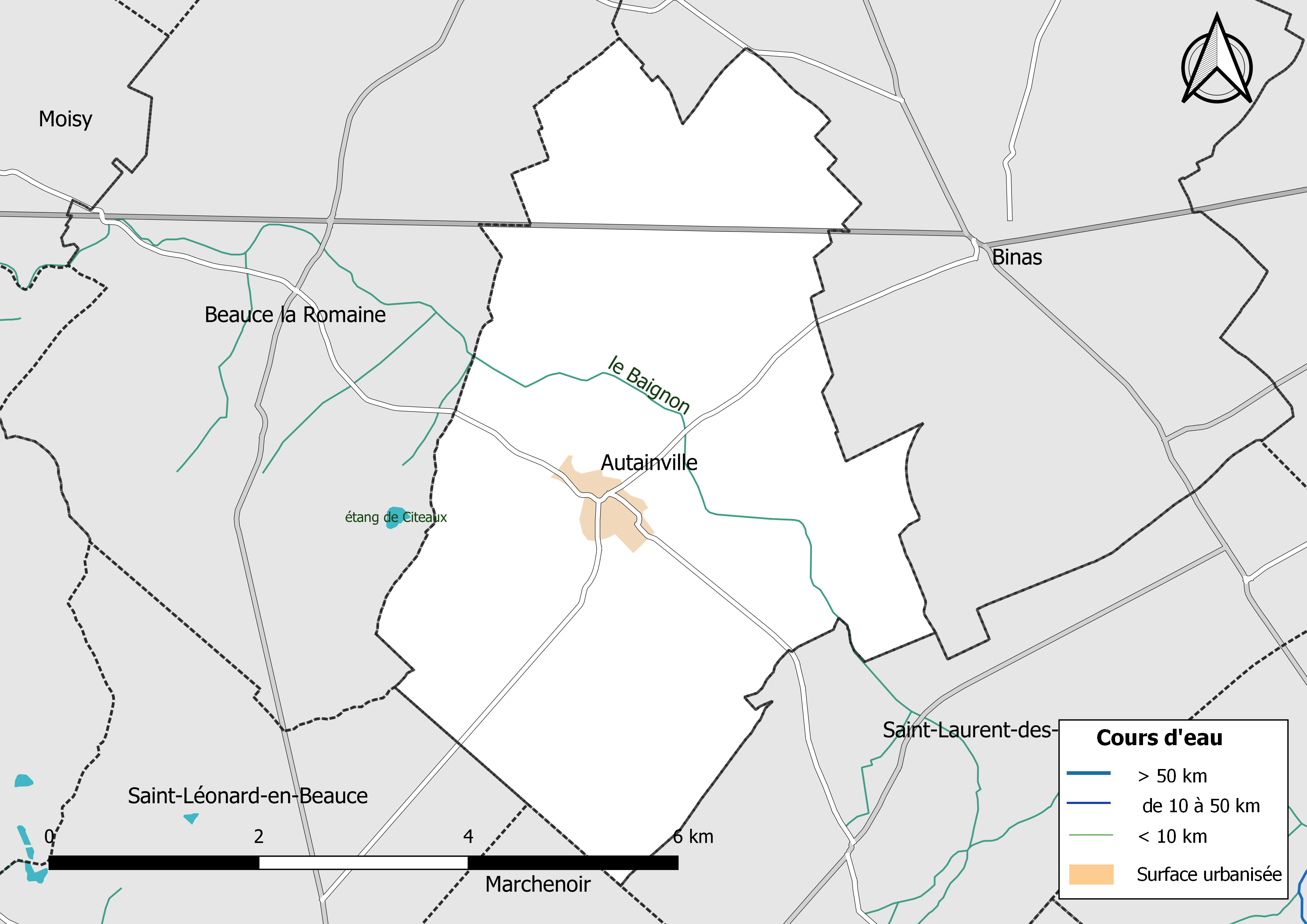 Carte du réseau hydrographique de la commune d'Autainville (France).